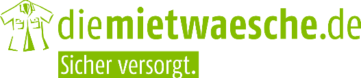 Logo von diemietwaesche.de